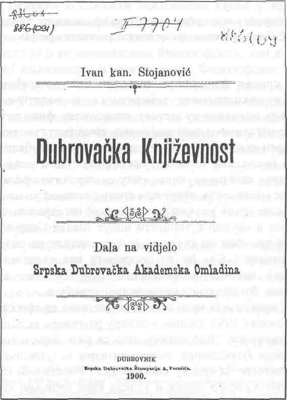 Dubrovačka Književnost